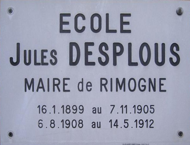 Photo plaque école de Rimogne